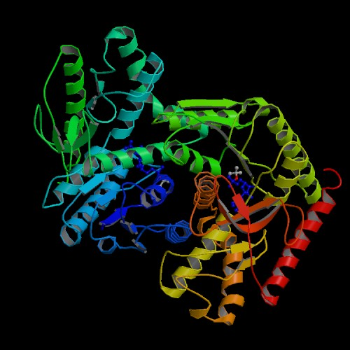 Malate dehydrogenase enzyme from Thermus_flavus.